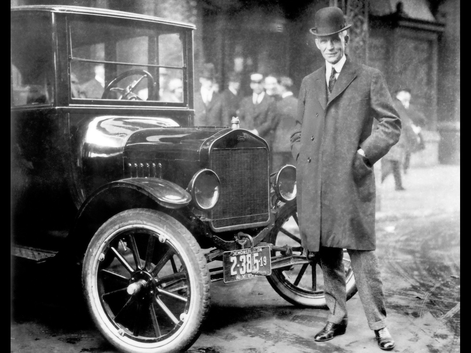 H.Ford avec son célèbre model T